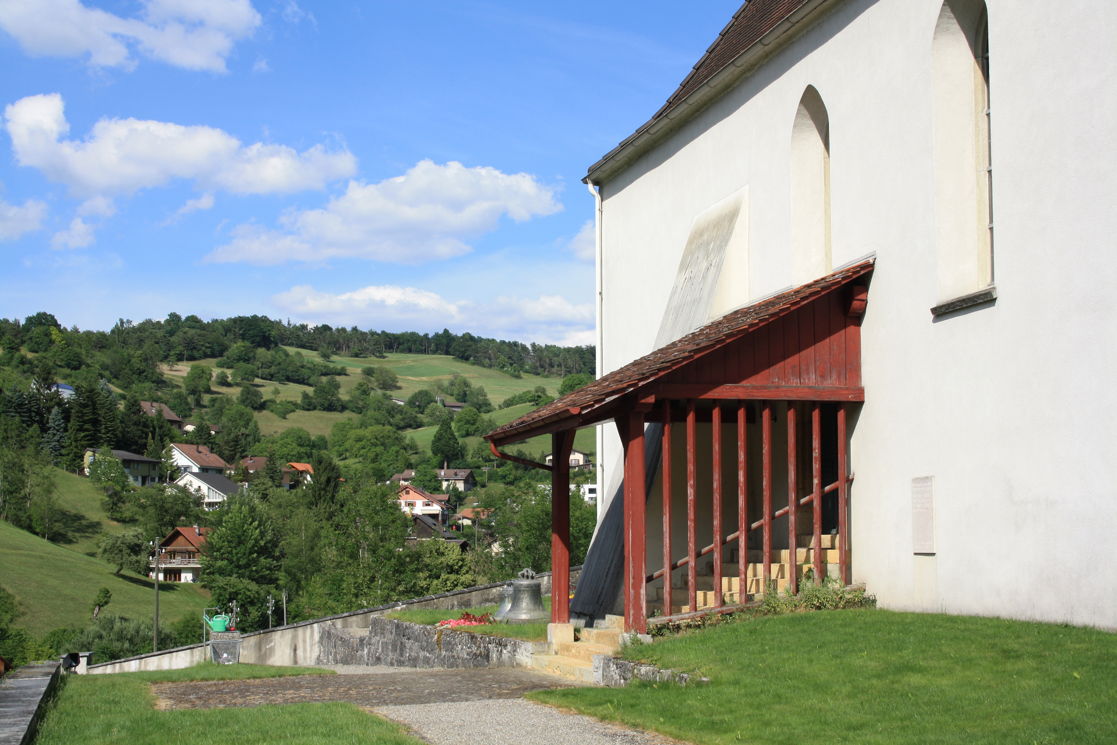 Reformierte Kirche Densbüren